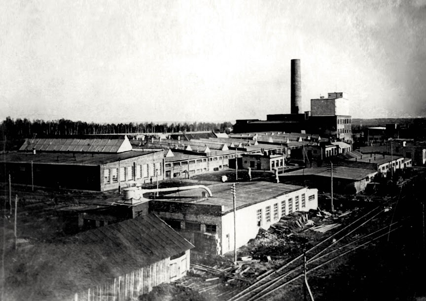 Магілёўская фабрыка штучнага валакна. 1930-я